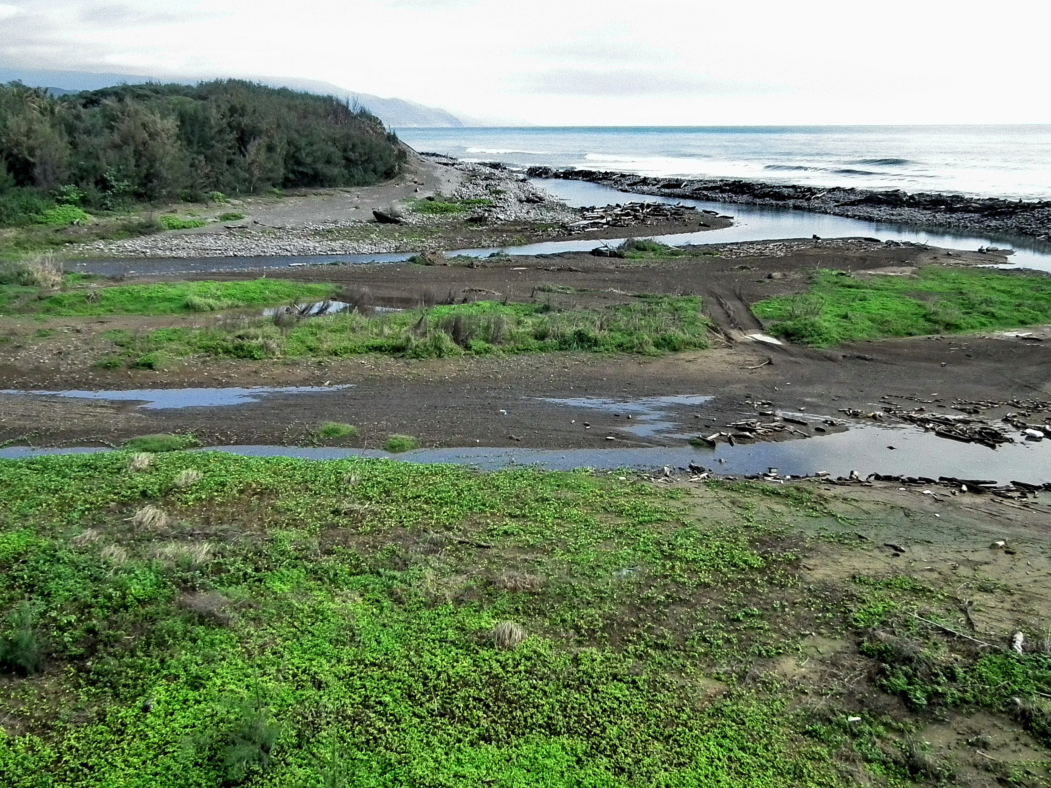 Fenggang River Estuary 楓港溪口